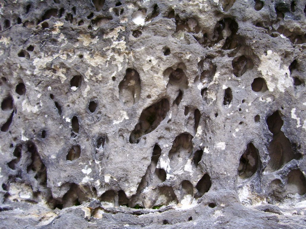 pieskovcové útvary v Národnom parku České Švýcarsko, Chránená krajinná oblasť Labské pískovce, vznikajú veternou eróziou